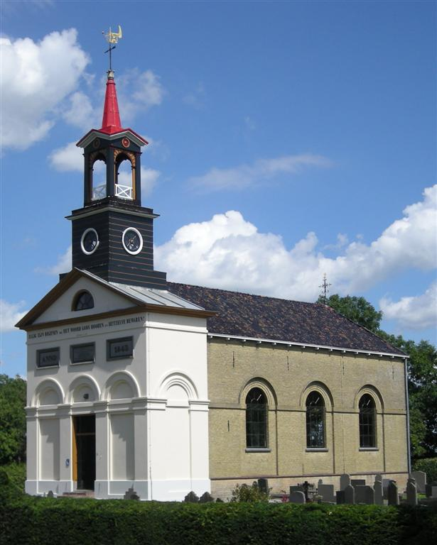 Rotondekerk (church) in Terband, Friesland